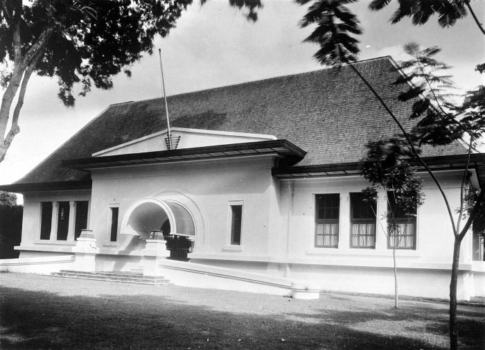 Repronegatief. De Raad van Indië was als instelling net zo oud als de functie van Gouverneur-Generaal. De directeuren van de VOC in Nederland, bekend als de Heren XVII, waren van mening dat collegiaal bestuur in Indië de voorkeur verdiende boven de alleenheerschappij van één man, de GG, al was het alleen maar om te zorgen dat deze zichzelf niet al te zeer zou verrijken ten koste van de Compagnie. In de 19e eeuw waren er GGs, zoals Johannes van den Bosch, de man van het Cultuurstelsel, die zoveel bevoegdheden uit het vaderland hadden meegekregen dat ze veel besluiten 'buiten Rade' konden nemen. (P. Boomgaard, 2001). Het gebouw van de Raad van Indië in Weltevreden, Batavia